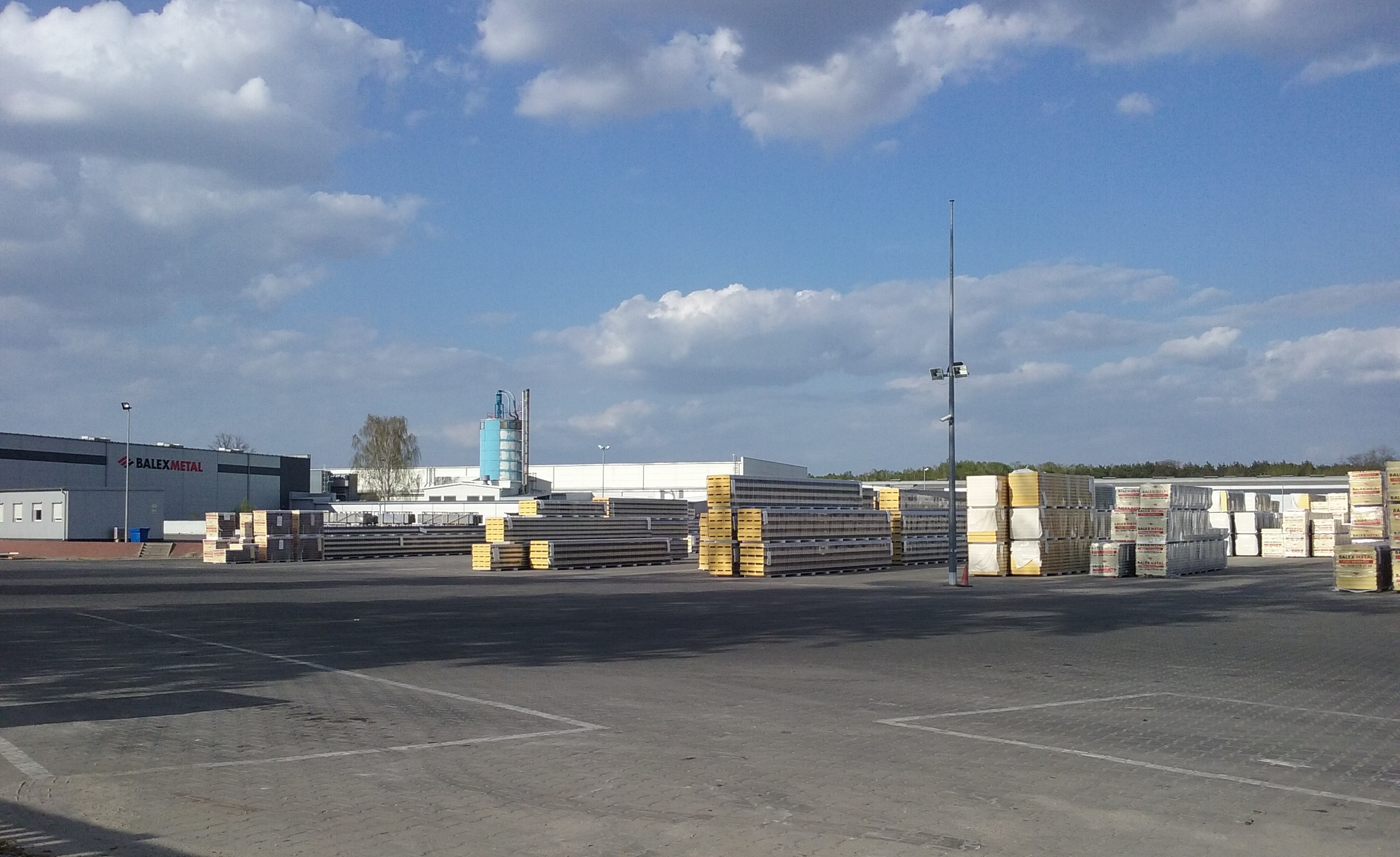 Tomaszów Mazowiecki województwie łodzkim. PL, EU. Balex Metal, fabryka w Tomaszowie, CC0